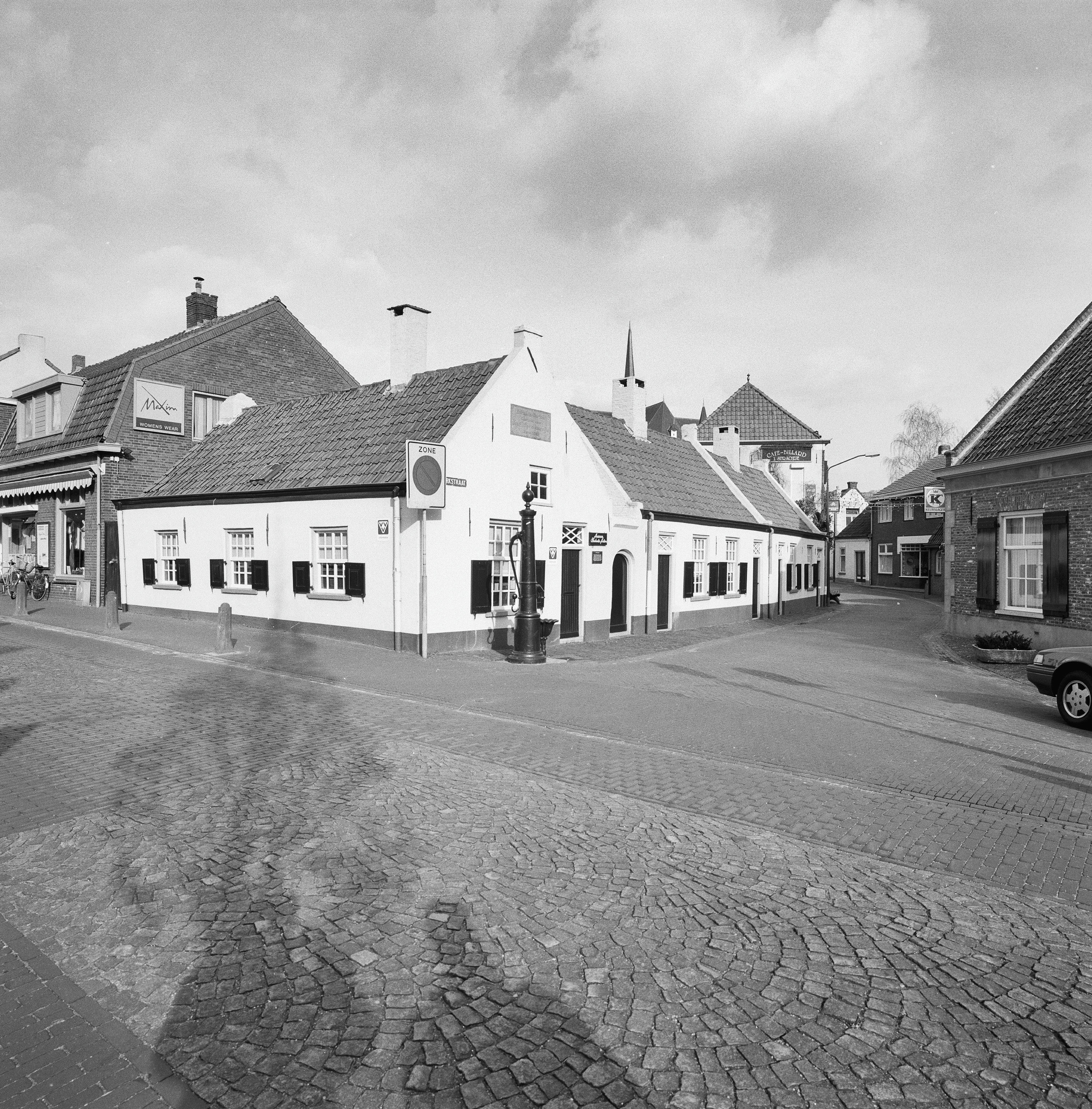 Sint Paulusgasthuis: Overzicht voorgevel en linker zijgevel en waterpomp (opmerking: Gefotografeerd voor Monumenten In Nederland Noord-Brabant, bladzijde 295)